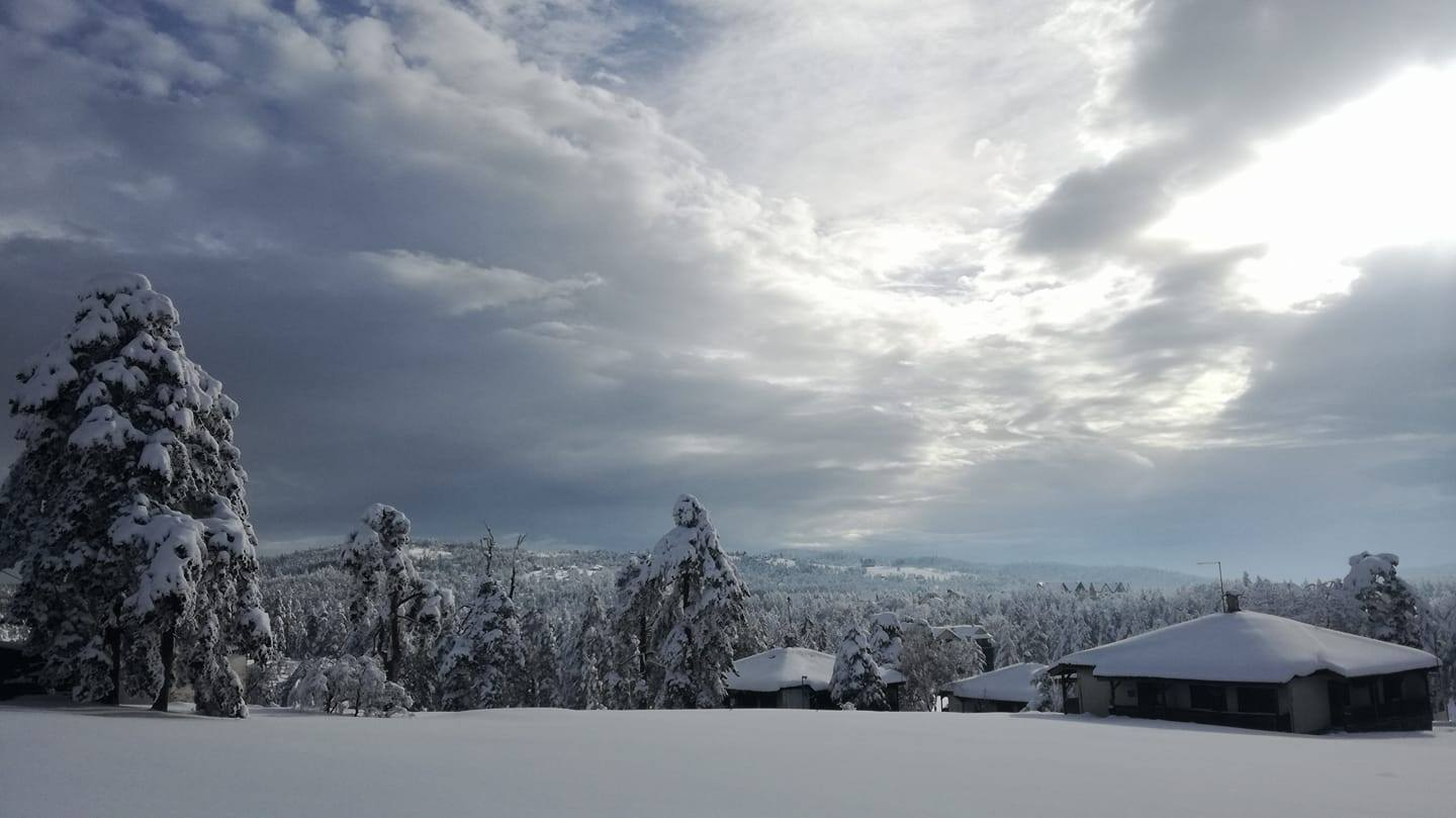 Дивчибаре - ваздушна бања